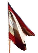 Bandera_Villamonte